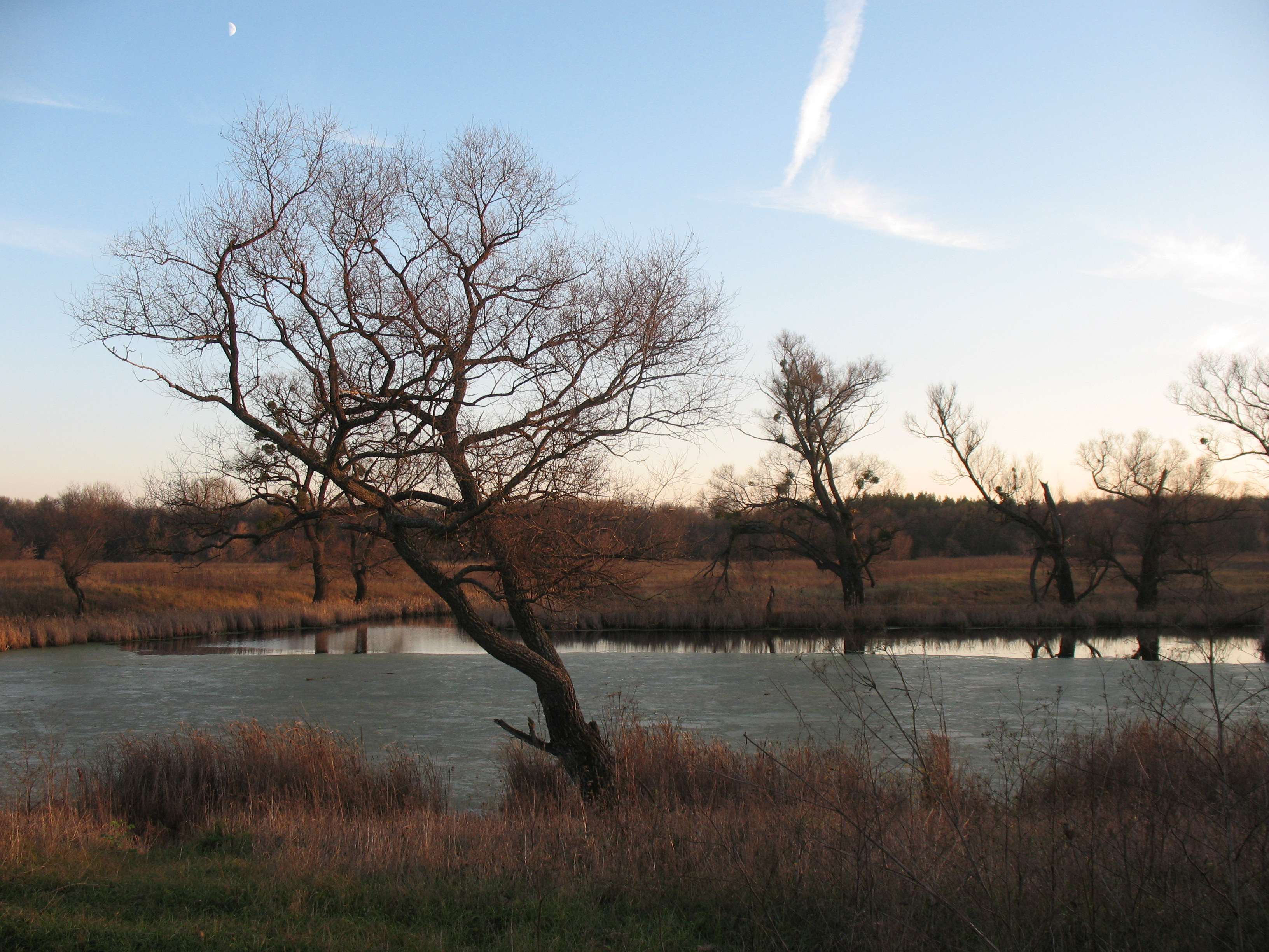 Мохначанский луг на правом берегу Донца на закате. Старица Северского Донца. Вид от Мохначанского леса к Донцу. На небе слева - растущий месяц.